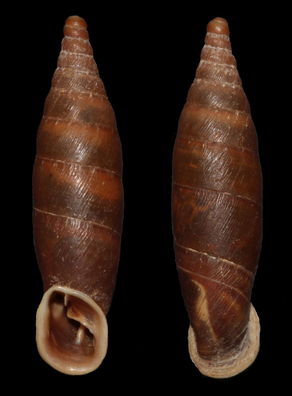 Specie endemica siciliana